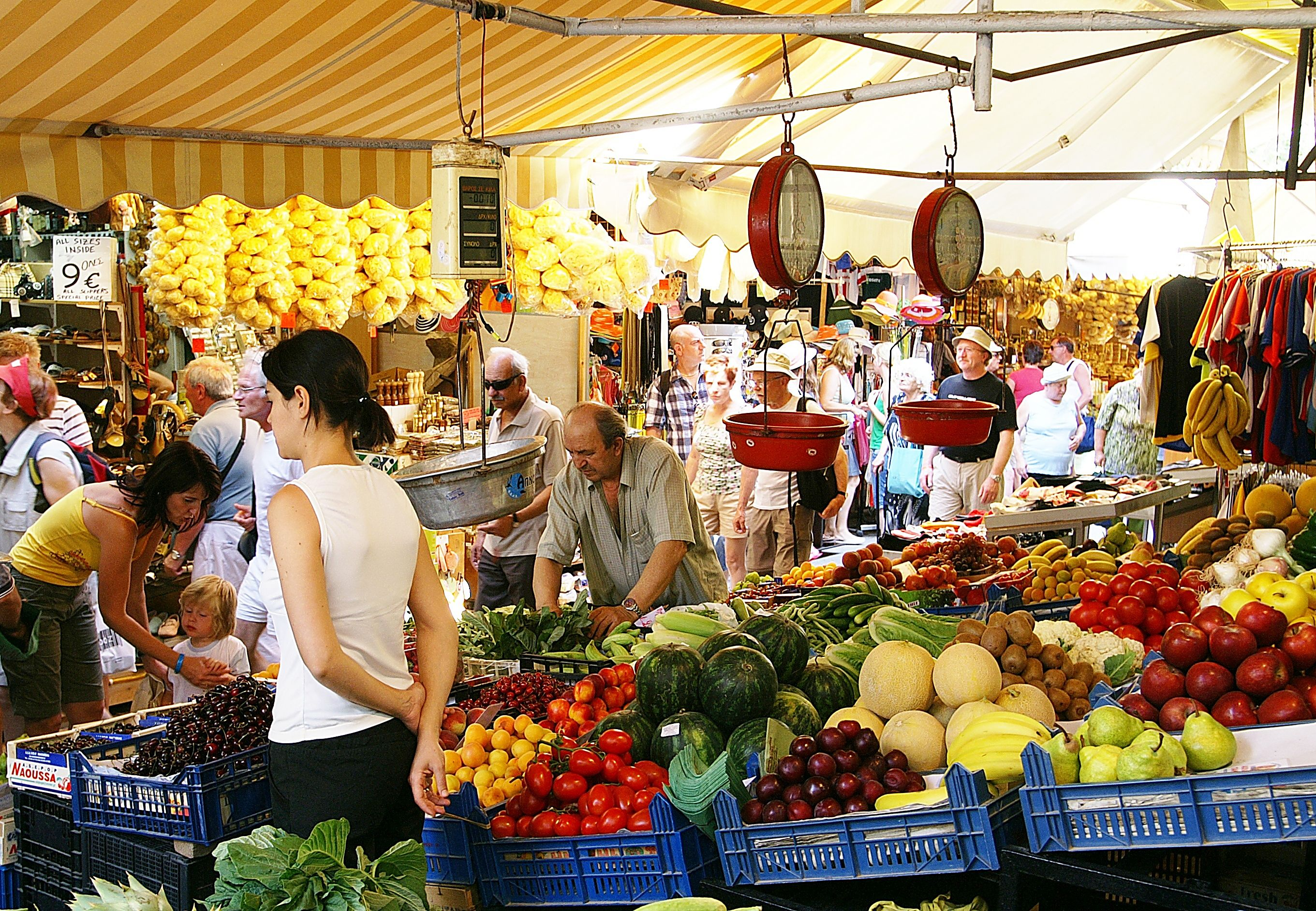 die Stadt Iraklio ist die größte Stadt der südgriechischen Insel Kreta